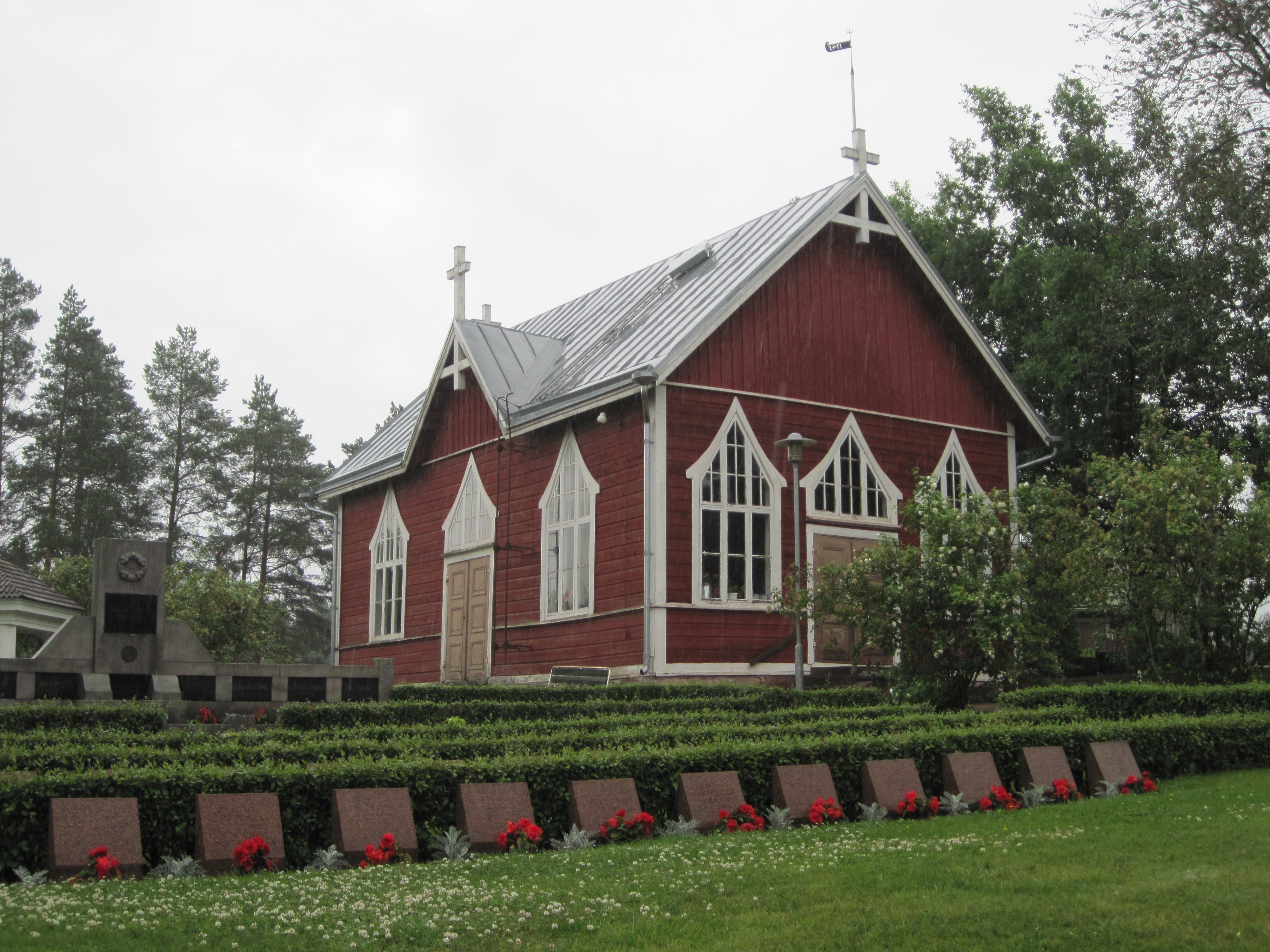 Luvian kirkon kappeli ja sankarihaudat kesällä 2012